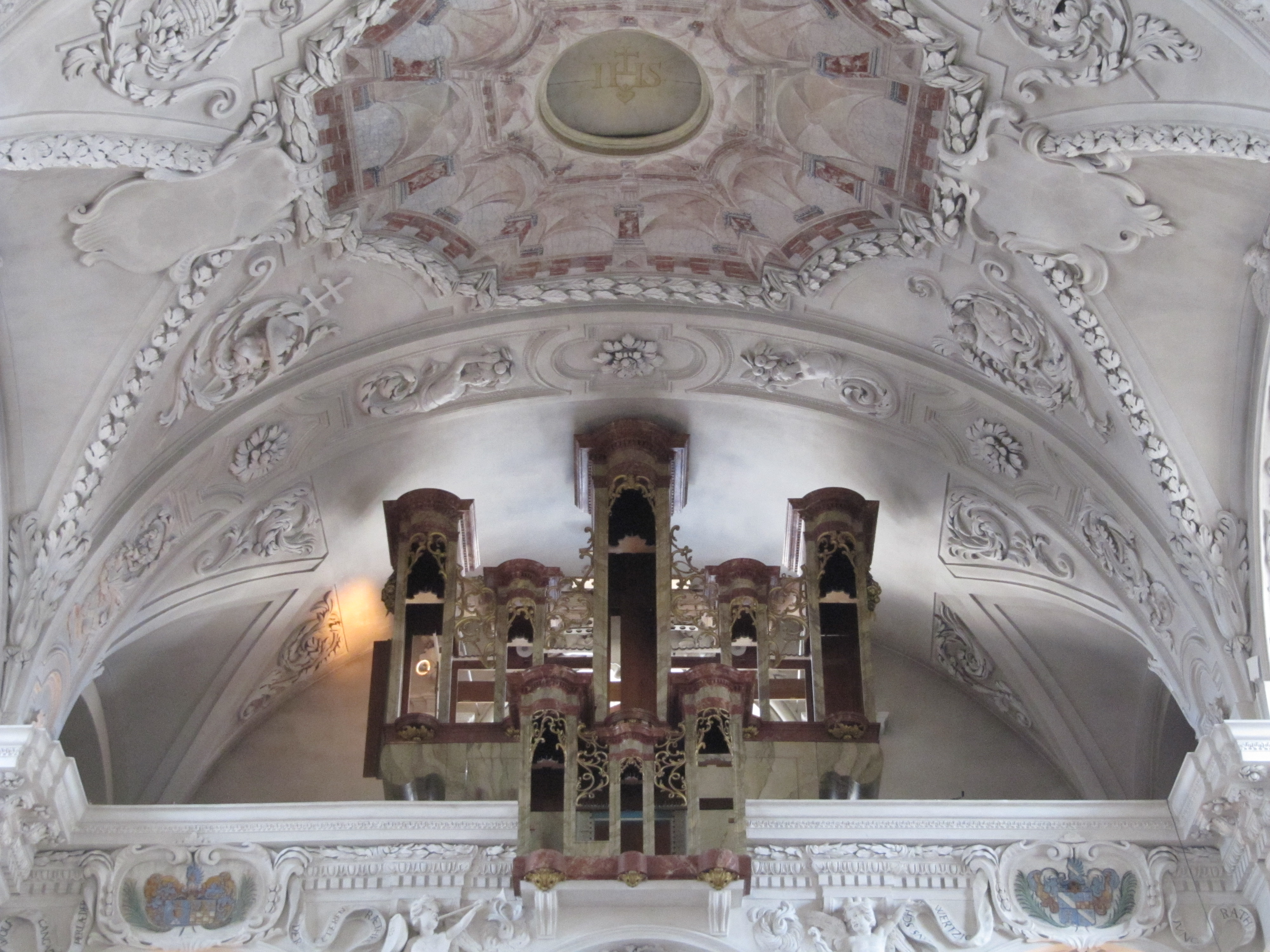 Buffet d'orgue dans la nef de l'église jésuite de Soleure (CH). Casing of the Organ in the jesuit church of Solothurn (CH), Gehäuse der Otter-Orgel in der Jesuitenkirche Solothurn (während der Restaurierung)